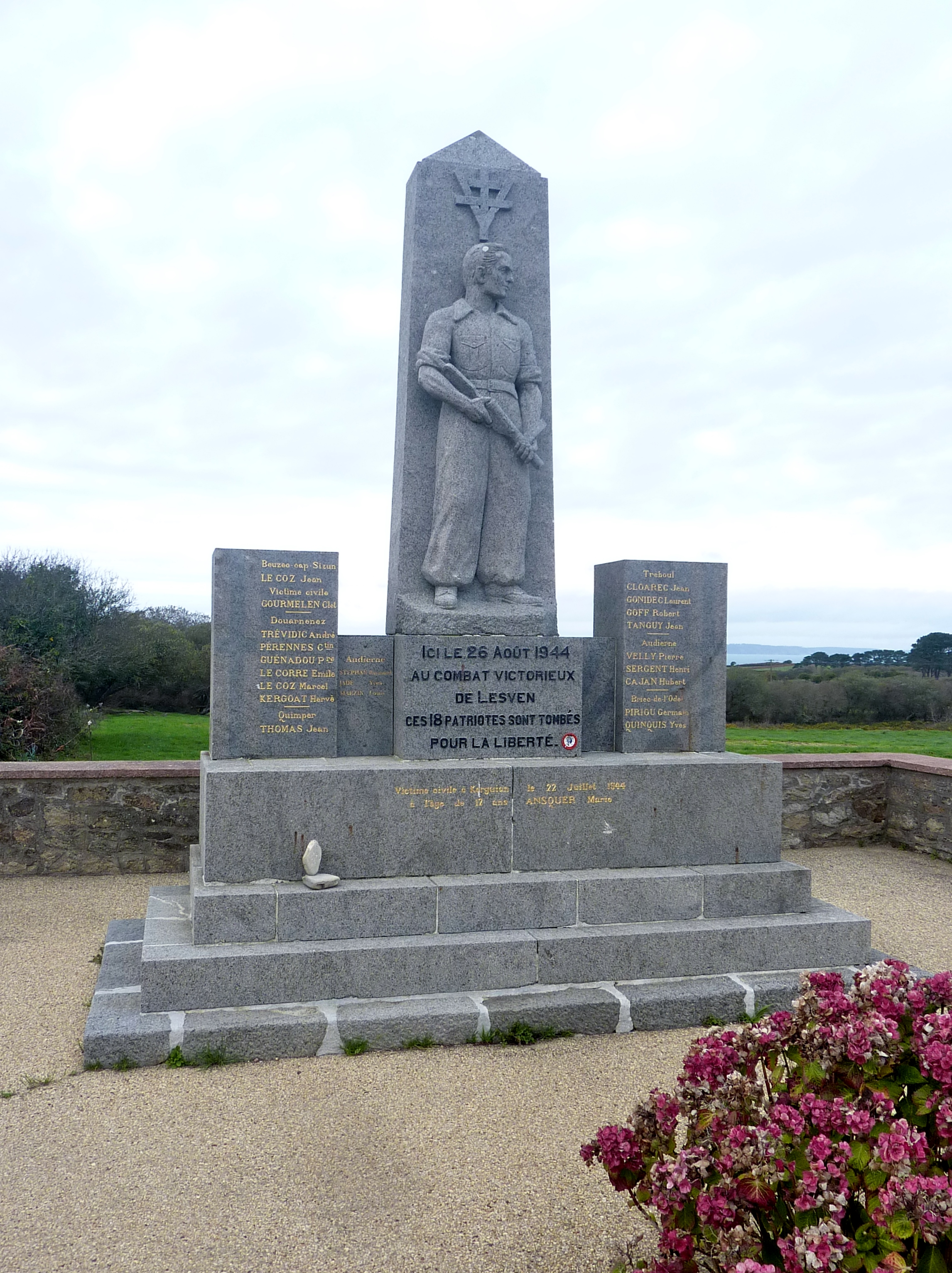 Beuzec-Cap-Sizun : la stèle commémorative des combats de Lesven le 26 août 1944.